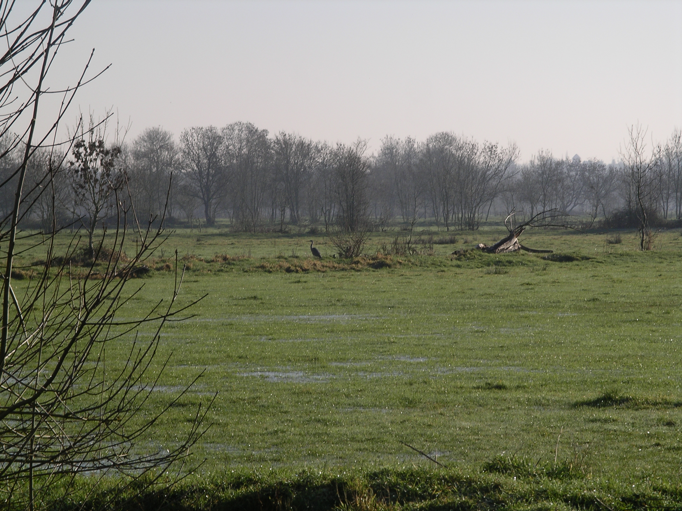 Photo du marais aububon de couëron dont je suis l'auteur.